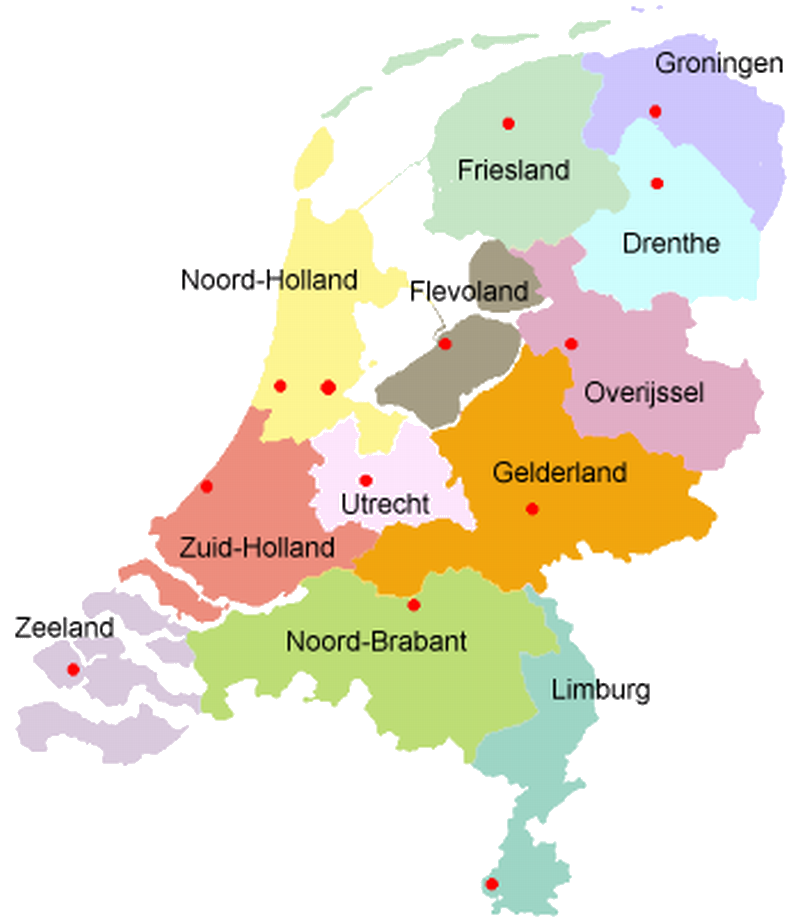 Kaart provincies van Nederland. Zelf gemaakt, vrij te gebruiken. Een vergelijkbaar kaartje in het Engels: nl::en:Image:Netherlands_map_small.png Categorie:Afbeelding provincie Nederland